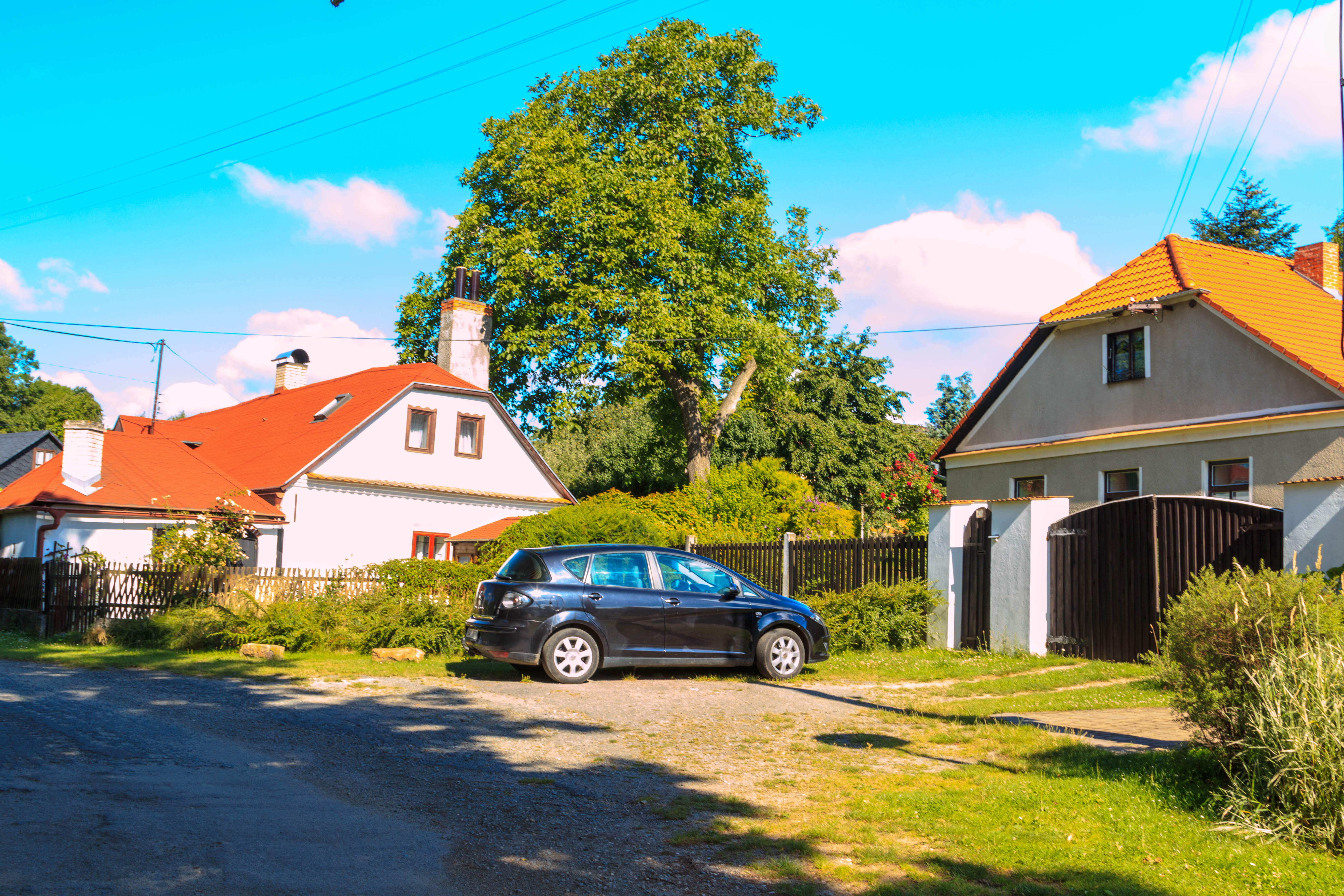 Zhoř čp. 40